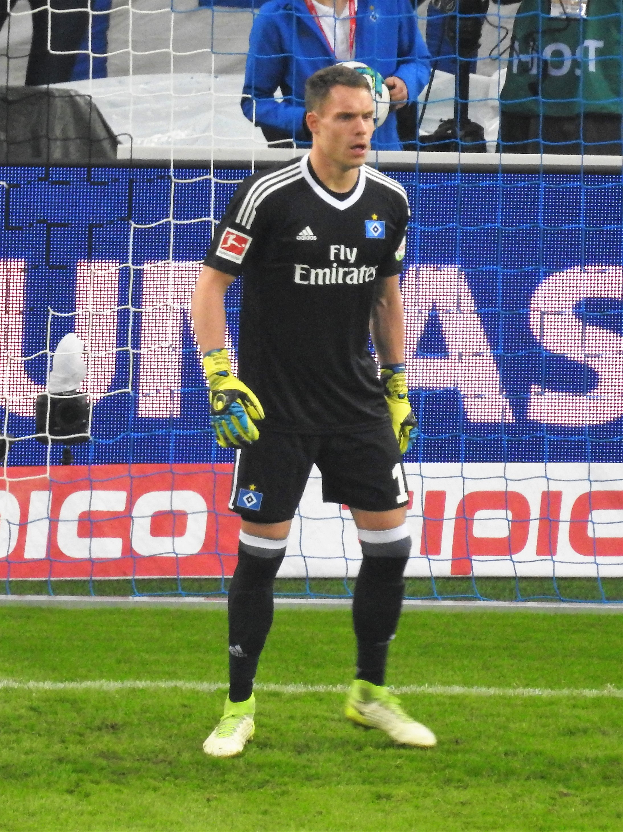 Mathenia, Christian HSV 17-18